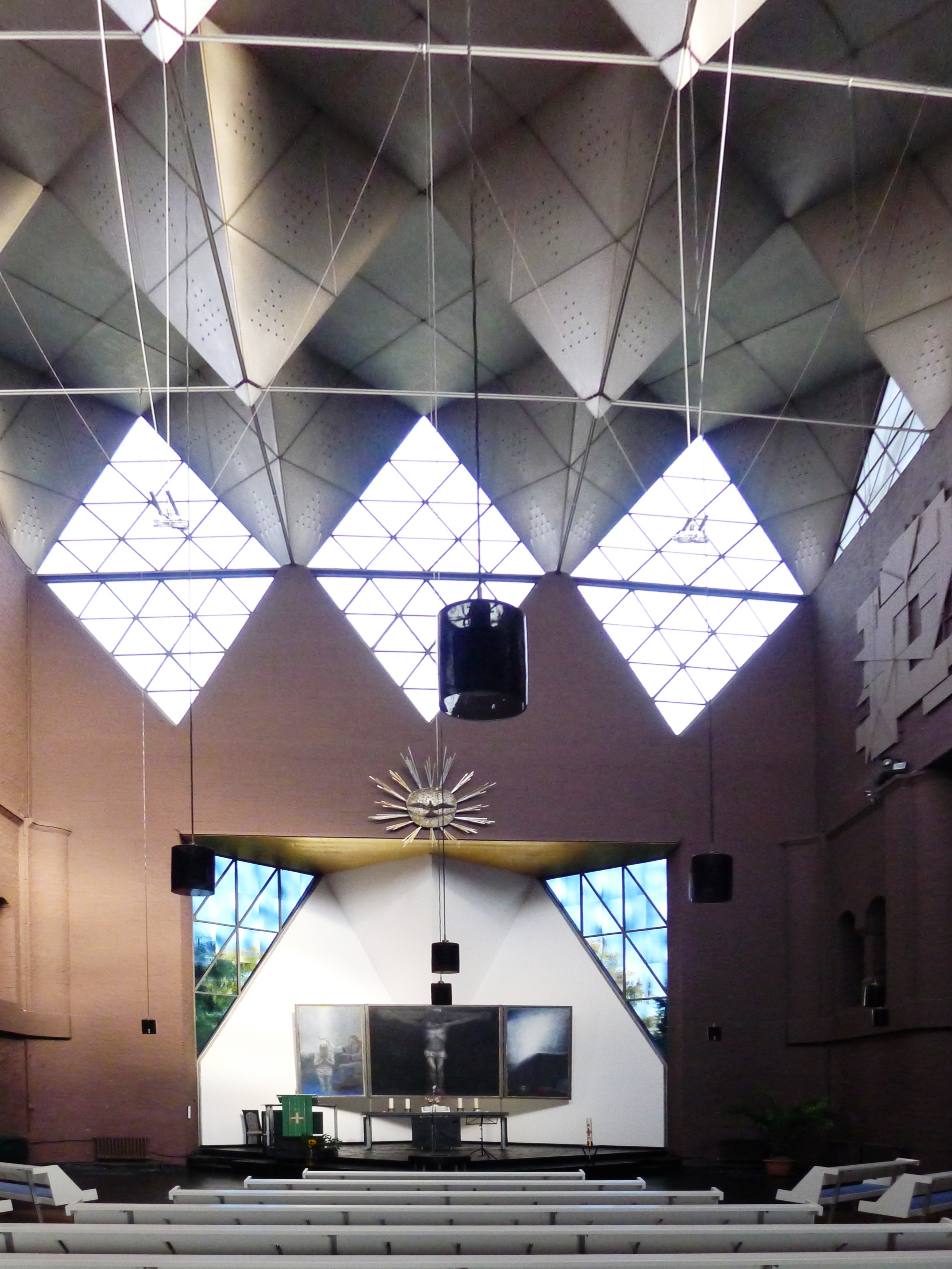 Neuer Altarraum im Norden des Kirchenschiffs